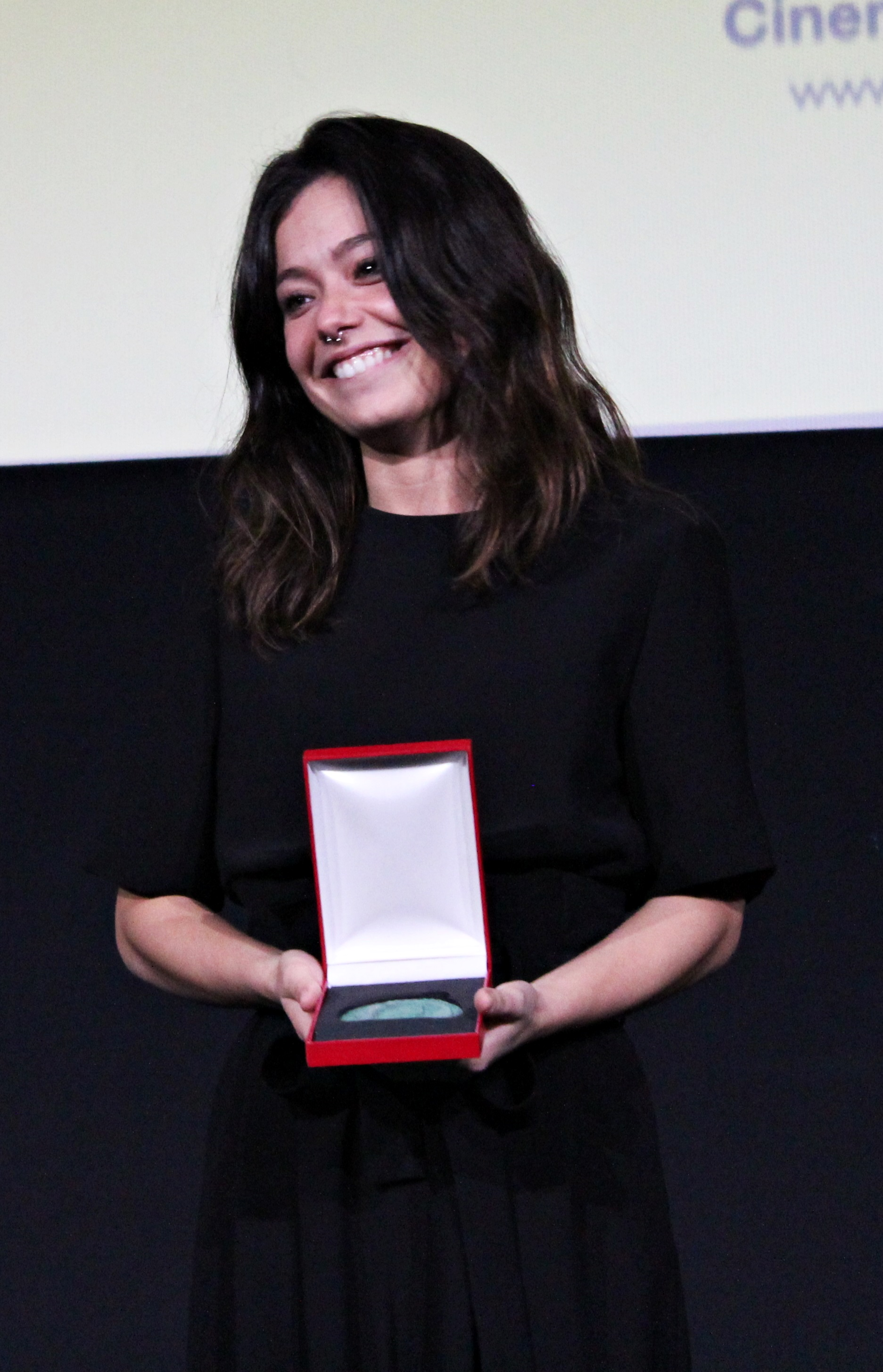 La actriz española Anna Castillo recibe la Medalla del Círculo de Escritores Cinematográficos a la mejor actriz secundaria en la 74 edición de las Medallas del CEC por su interpretación en la película Viaje al cuarto de una madre.